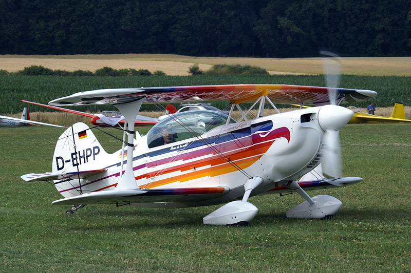 Christen Eagle II D-EHPP